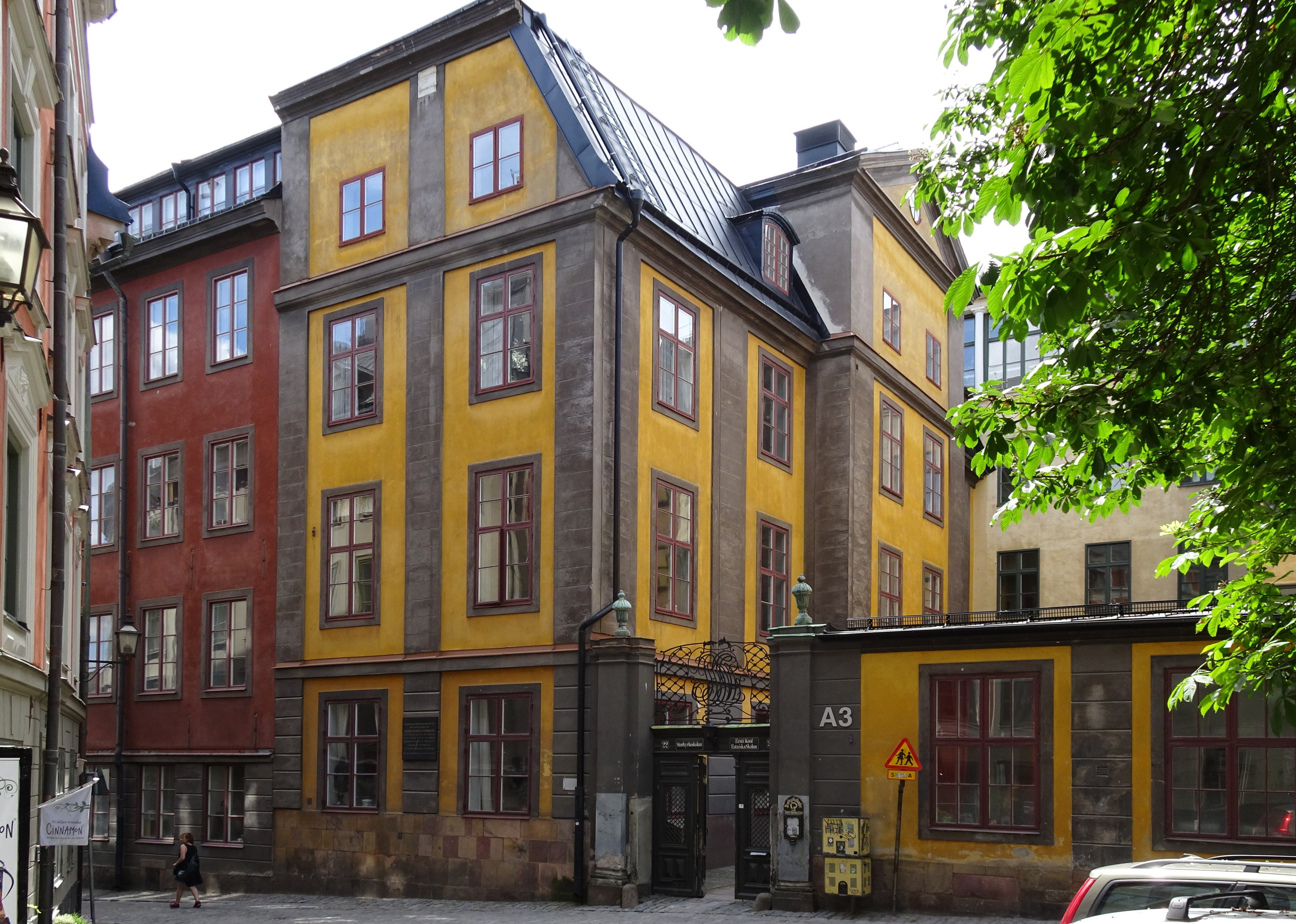 Ehrenstrahlska huset även kallar Fuhrmannska huset